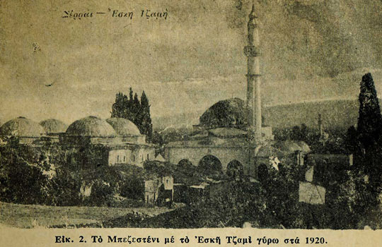 Серският безистен и Ески джамия